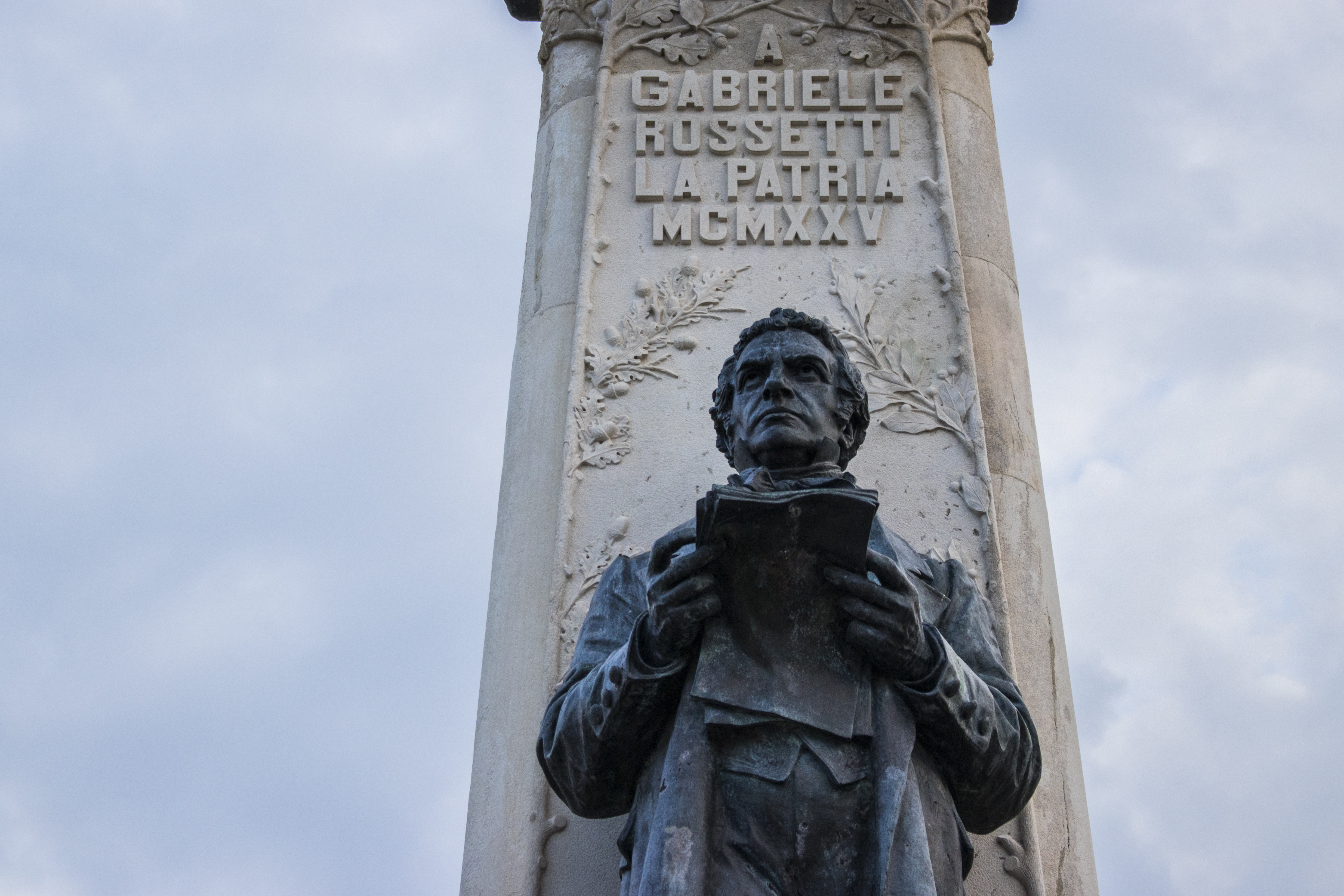 Primo piano del monumento a Gabriele Rossetti. This is a photo of a monument which is part of cultural heritage of Italy.